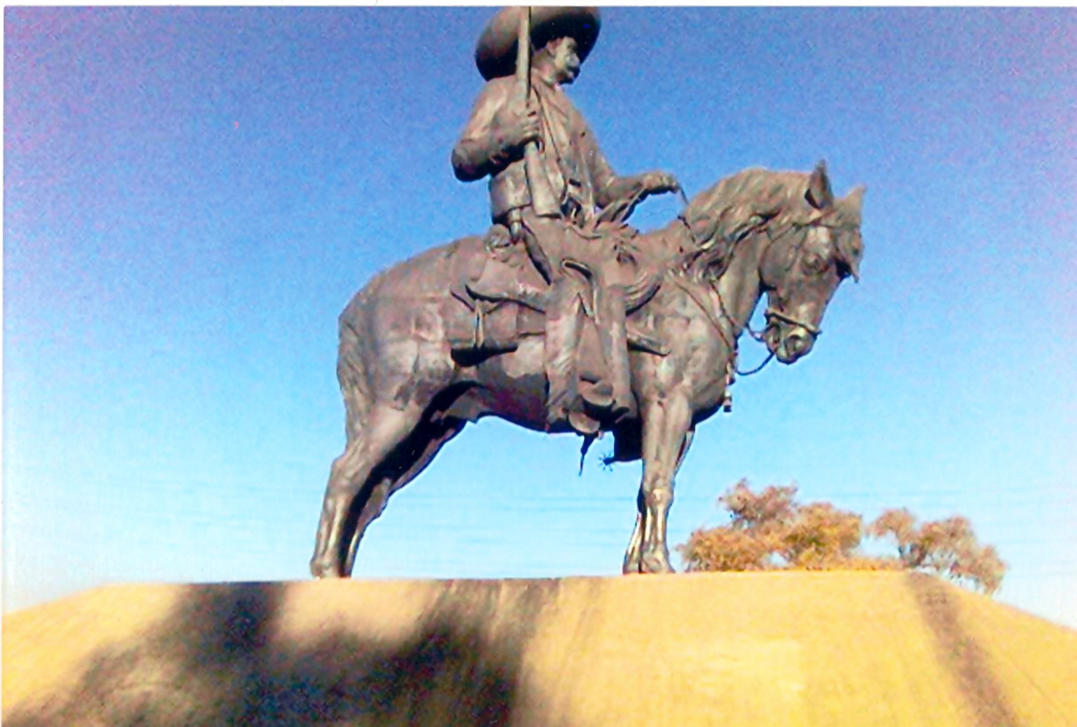 Statue equestre de Zapata